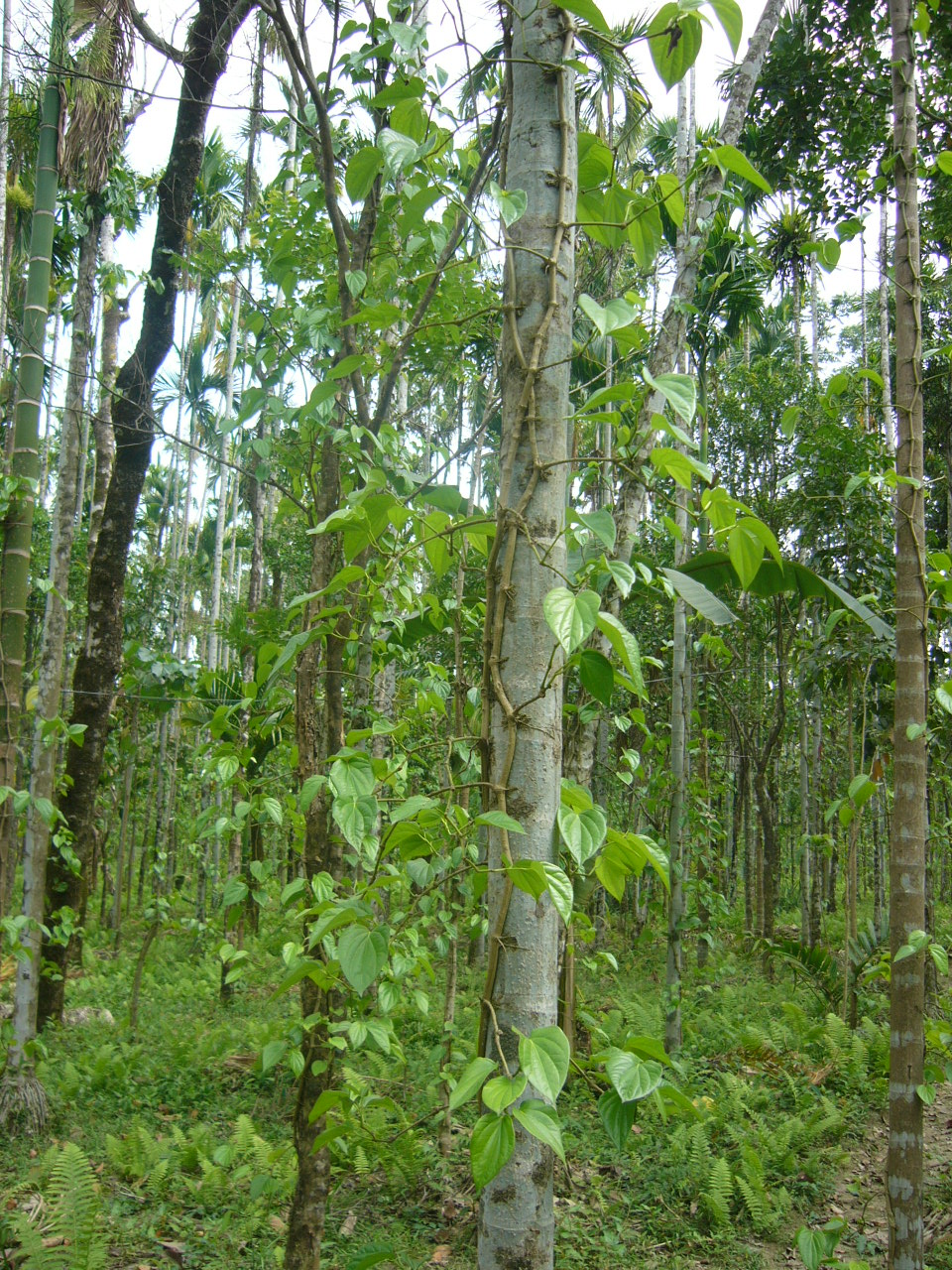 Betel leaf in Jaflong Sylhet Bangladesh